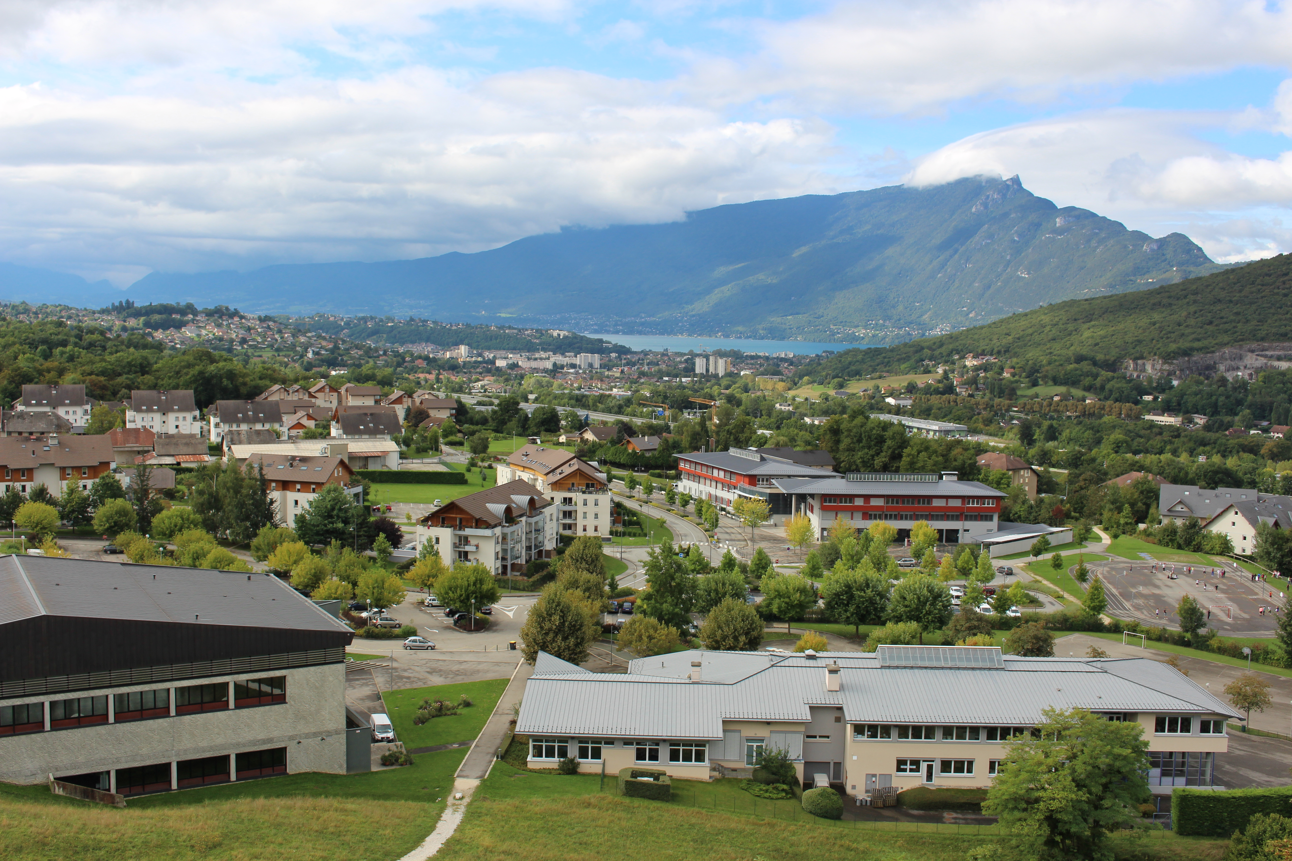 Грези-Сюр-Экс. Вид на озеро Буржэ